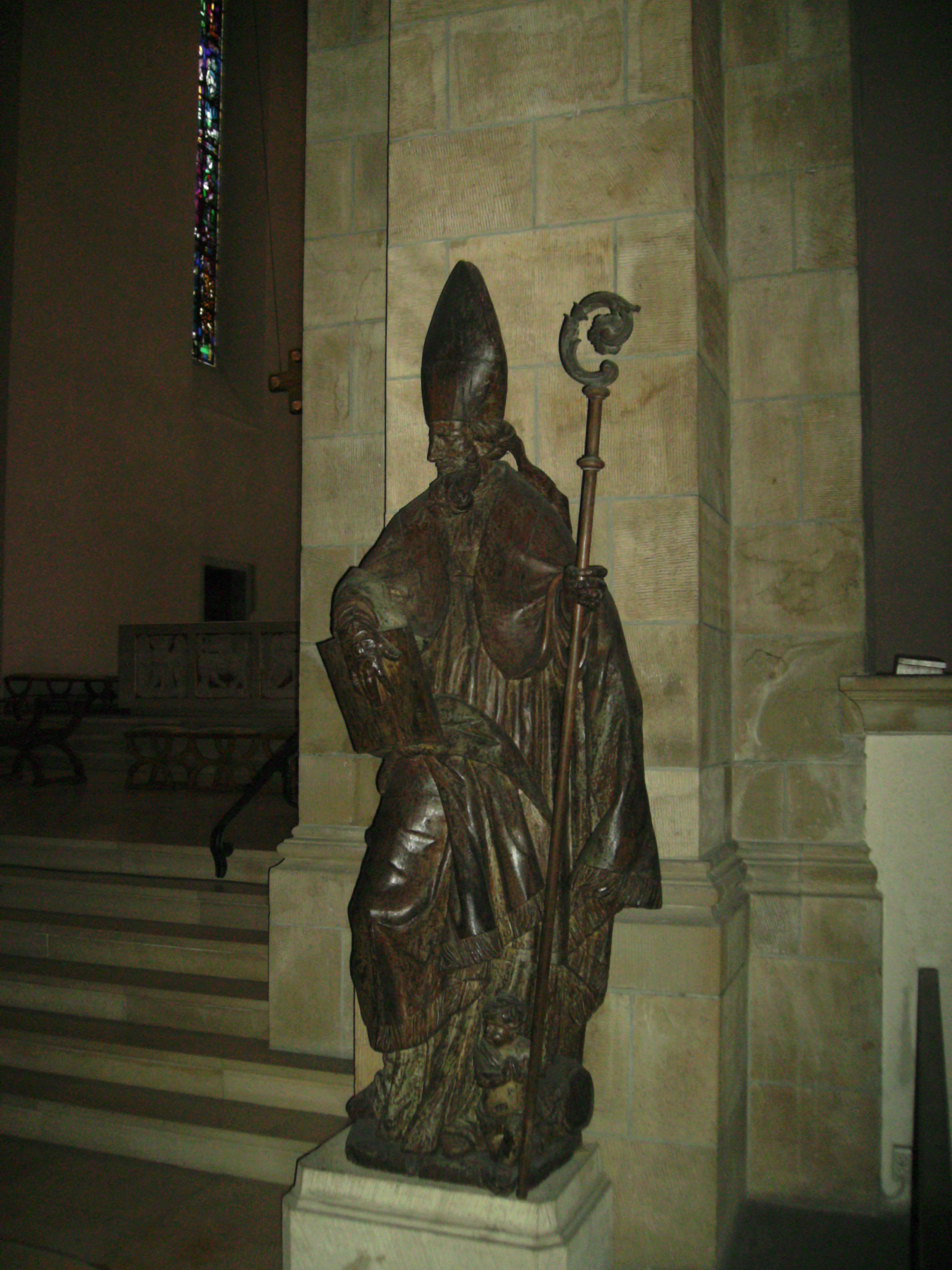 Willibrord: Statue des Heiligen in der Klosterkirche Echternach